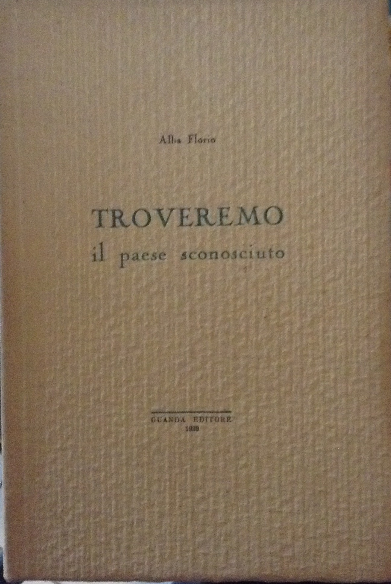 Copertina libro di Alba Florio